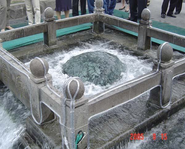 中文（中国大陆）: 山东济南七十二名泉之墨泉，位于章丘境内的百脉泉群。